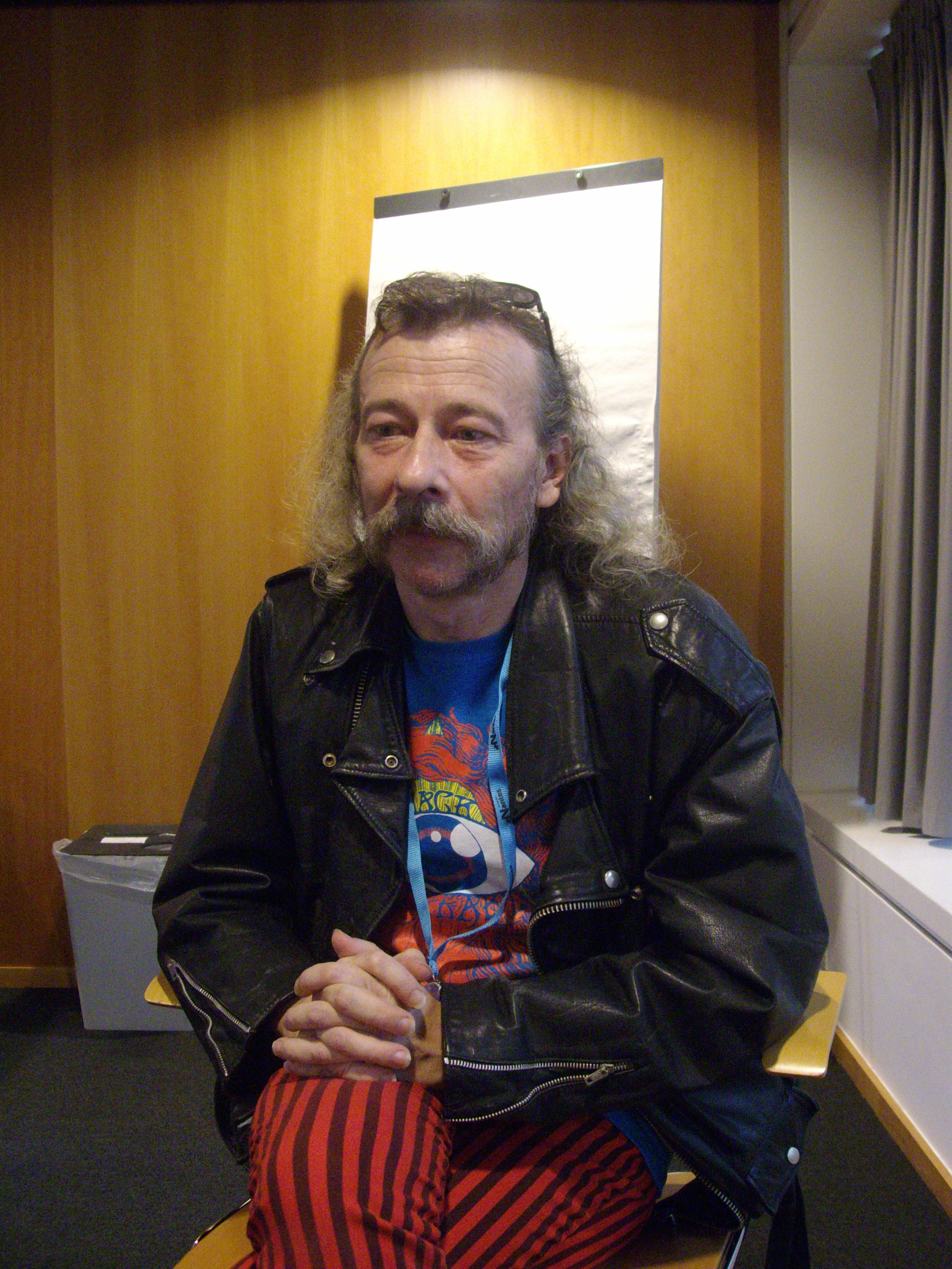 Roland C. Wagner aux Utopiales 2011